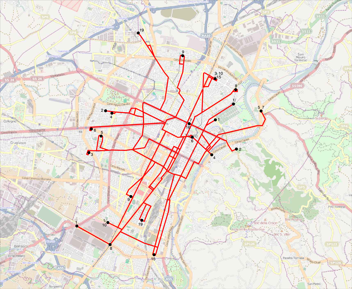 Mappa della rete tranviaria urbana di Torino nel 1982, prima dell'introduzione della cosiddetta "griglia di Rolando".